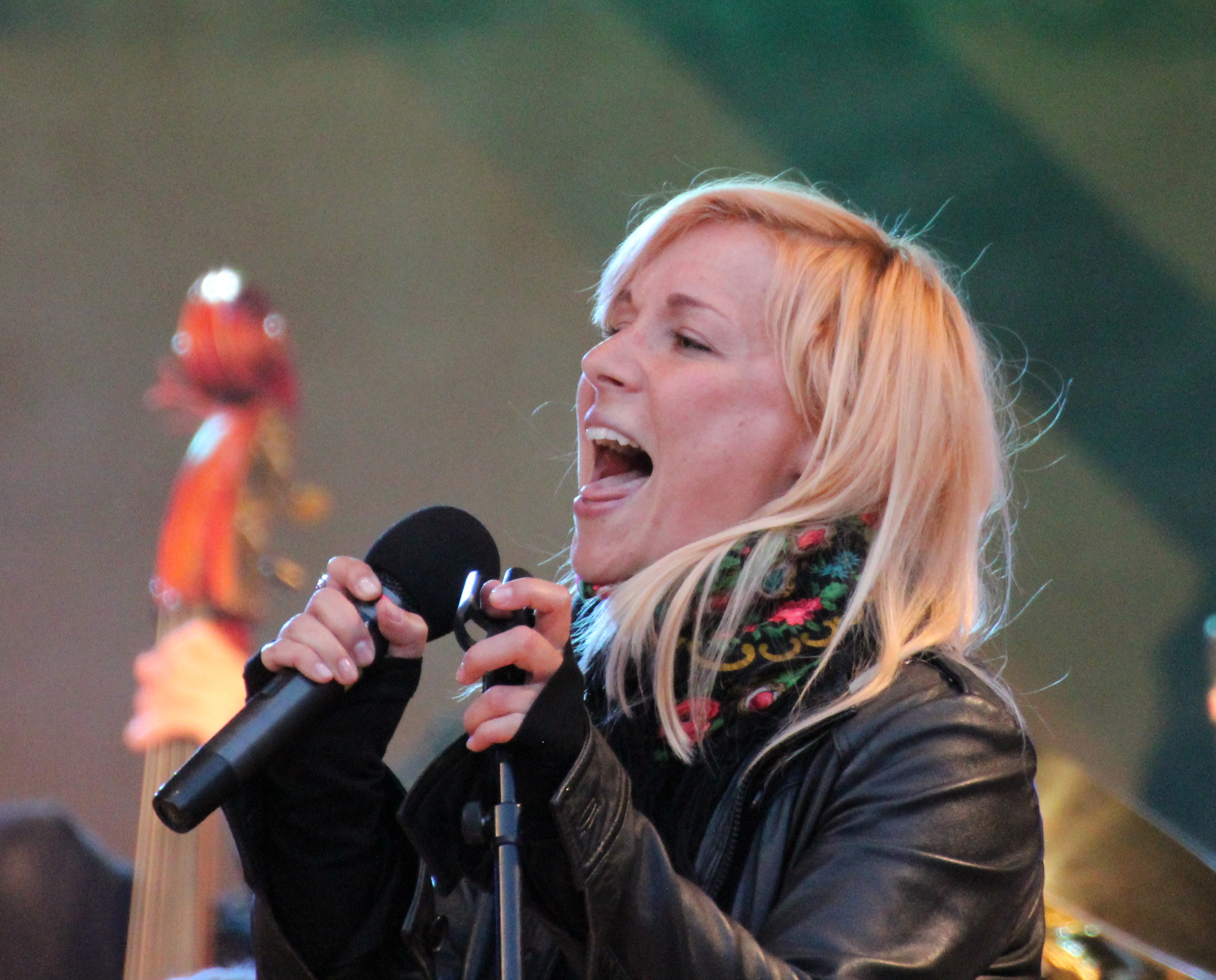 Lenna Kuurmaa esinemas Tallinnas Raekoja platsil.